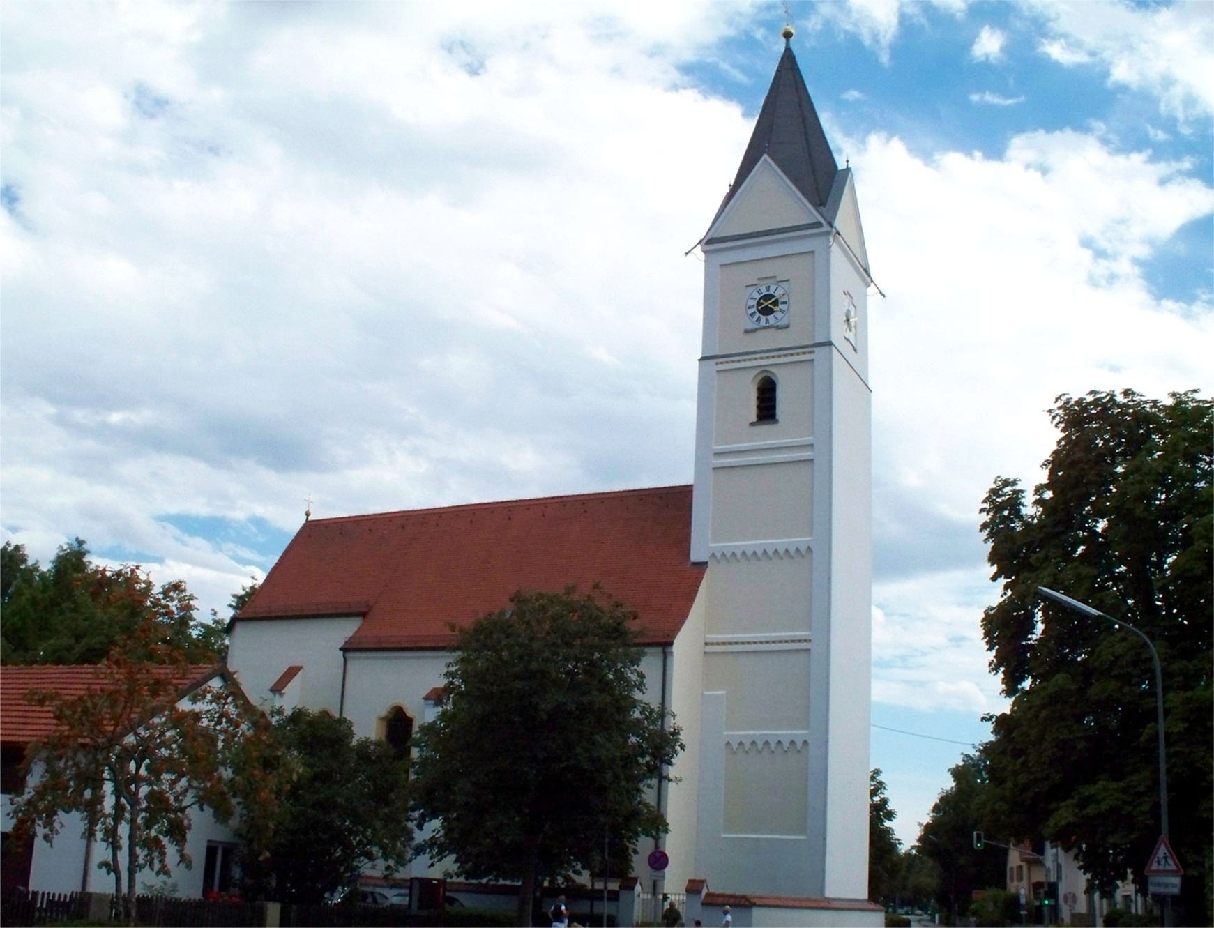 Alte Kirche (Hl. Kreuz/St. Wilgefortis) an der Dietersheimer Straße in Neufahrn bei Freising